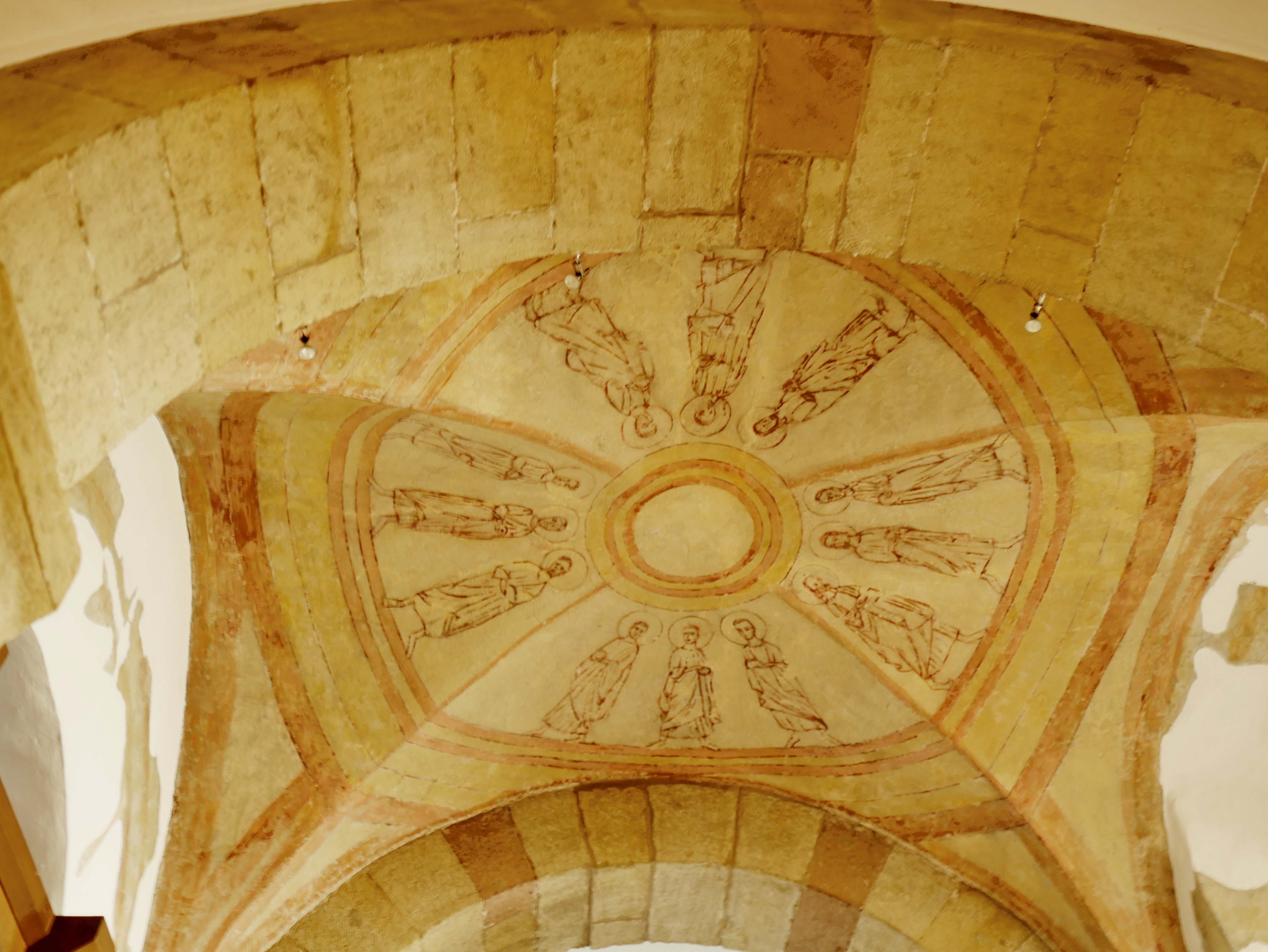 Marienwallfahrtskirche in Girsterklaus bei Rosport (Luxemburg), Romanische Fresken in der Vierung